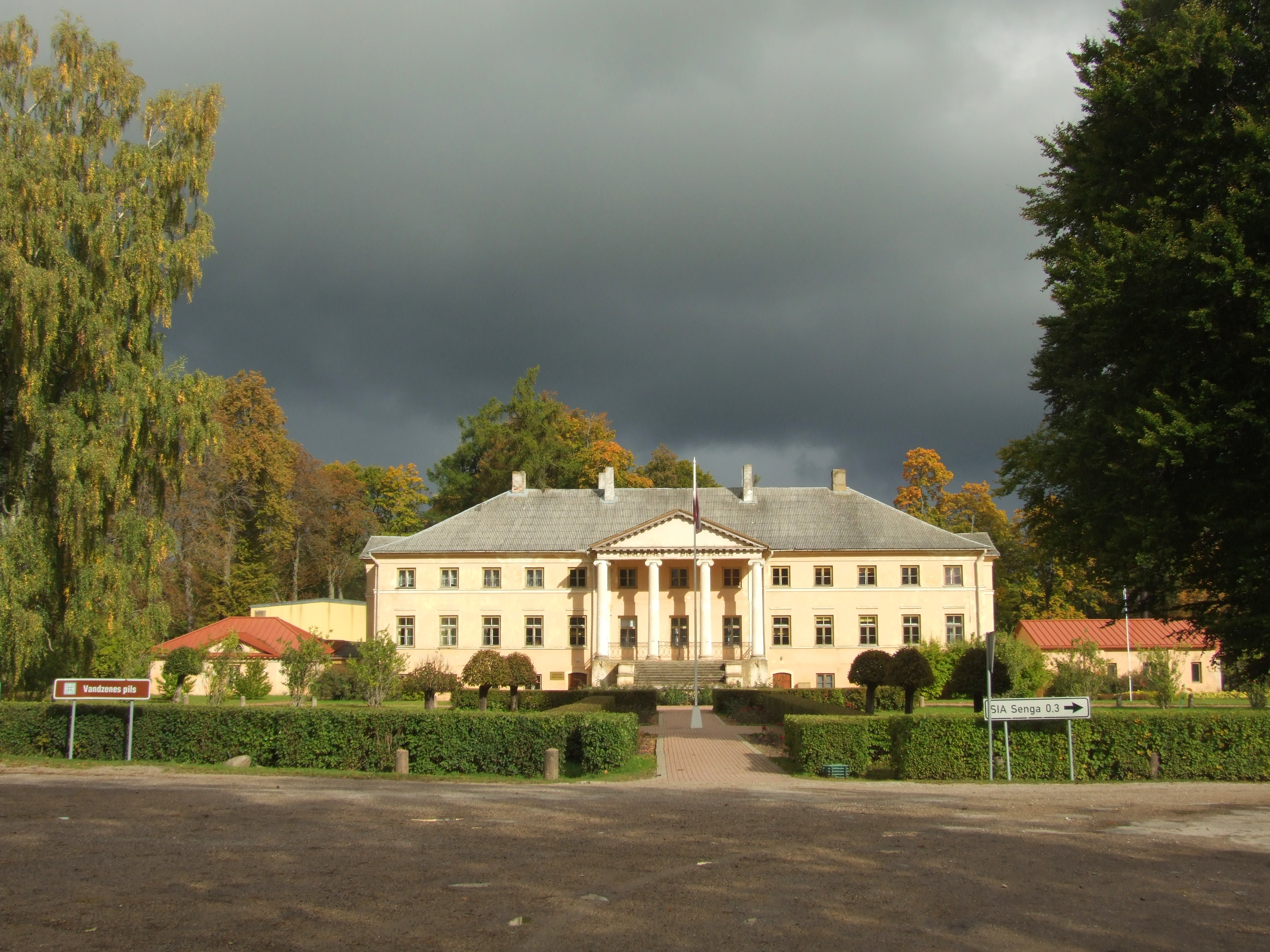 Vandzenes muiža /manor